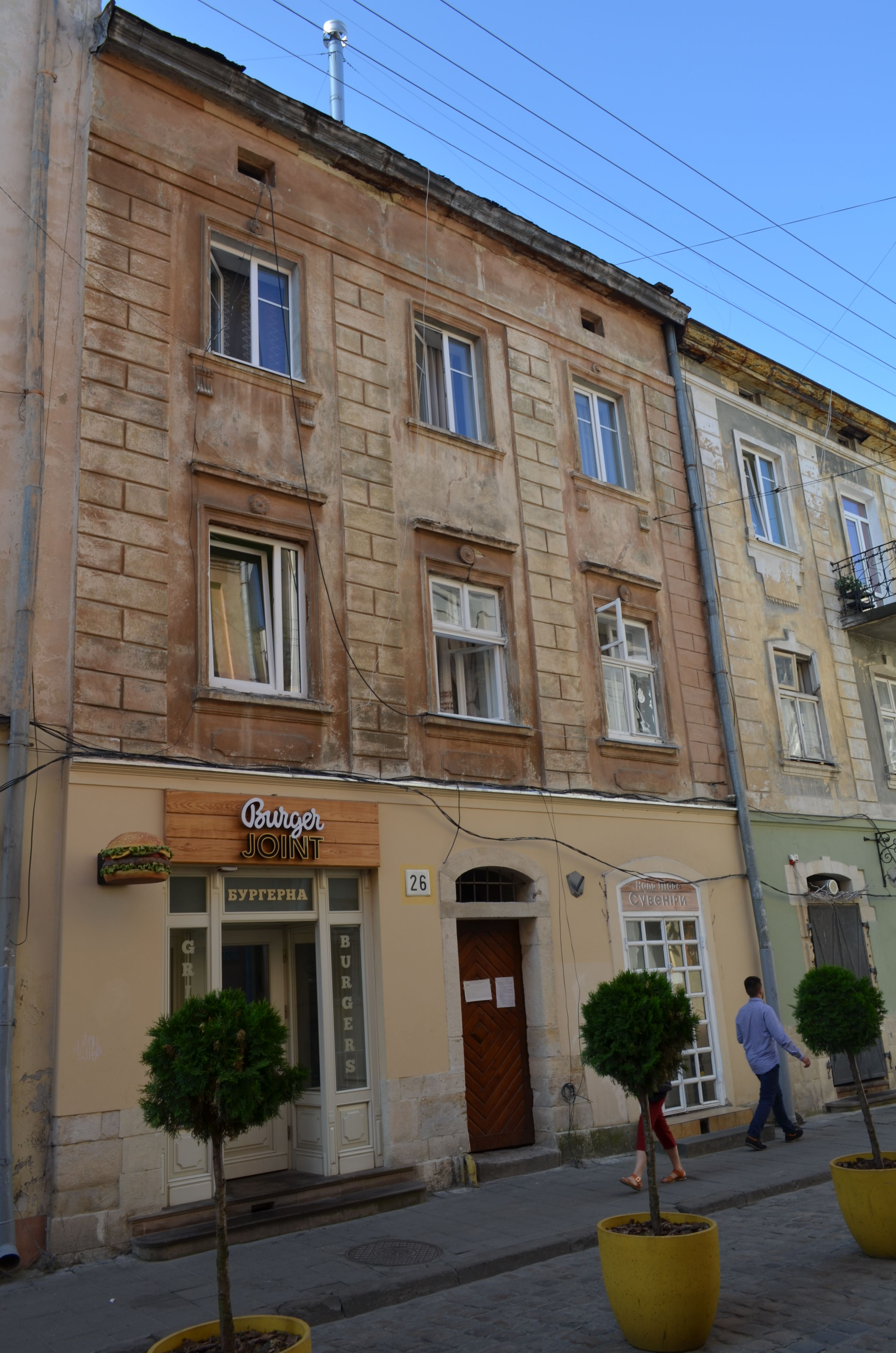 житловий будинок, Львів, Староєврейська, 26